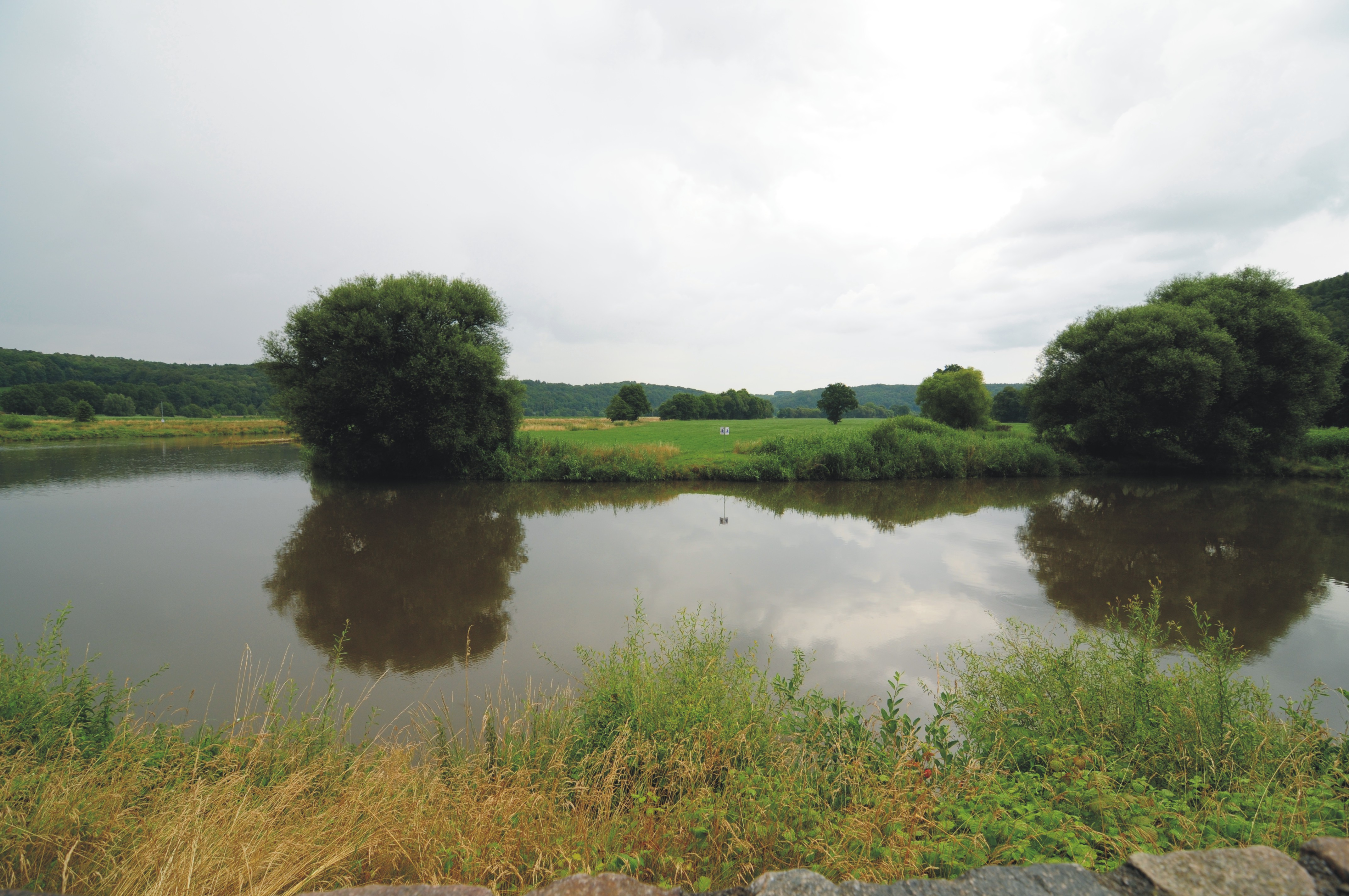 Freiberger Mulde am Kloster Buch, Blick talaufwärts (Sachsen, Deutschland)